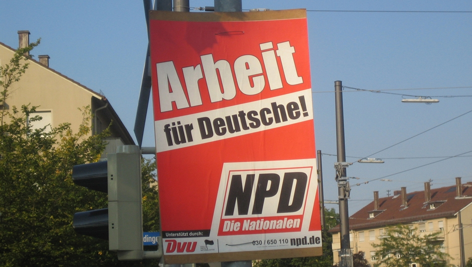 Plakat der NPD zur Bundestagswahl 2005, selbst fotografiert Keine Schöpfungshöhe